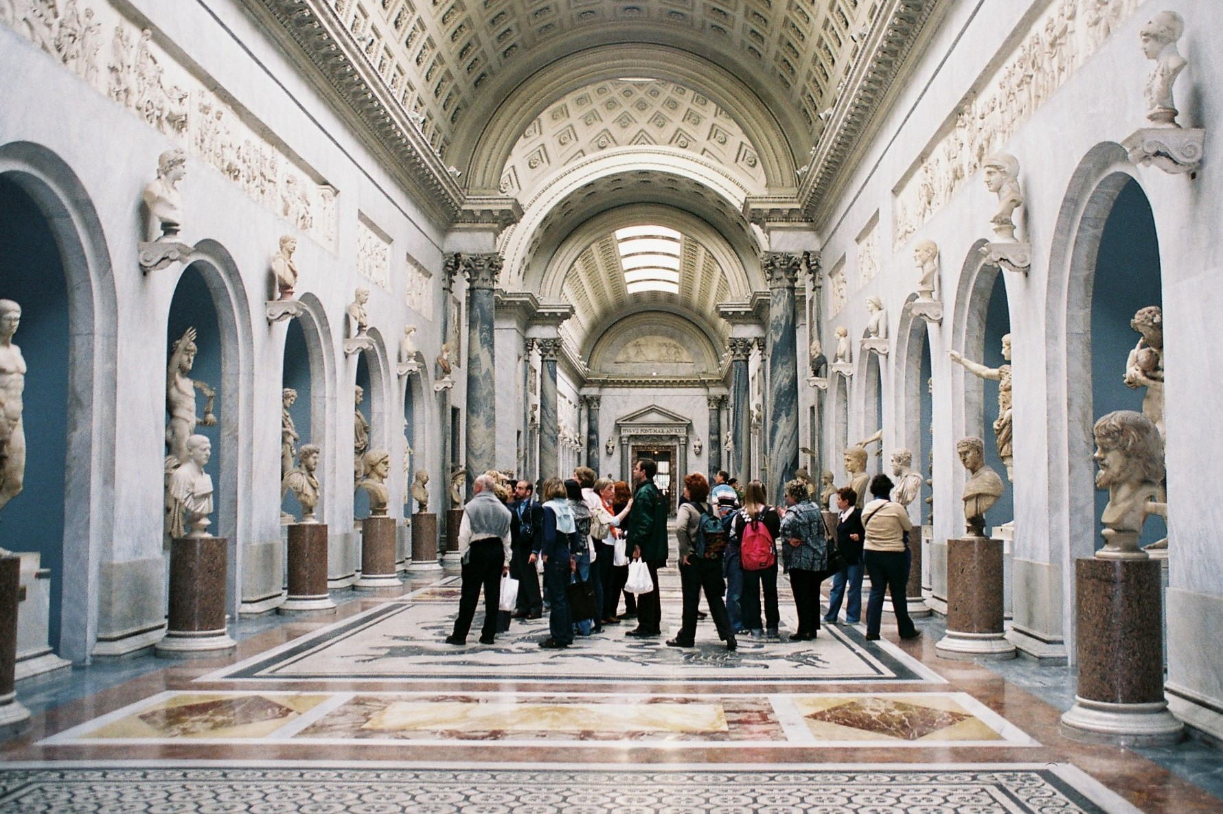 Musei Vaticani: Braccio Nuovo (inside).